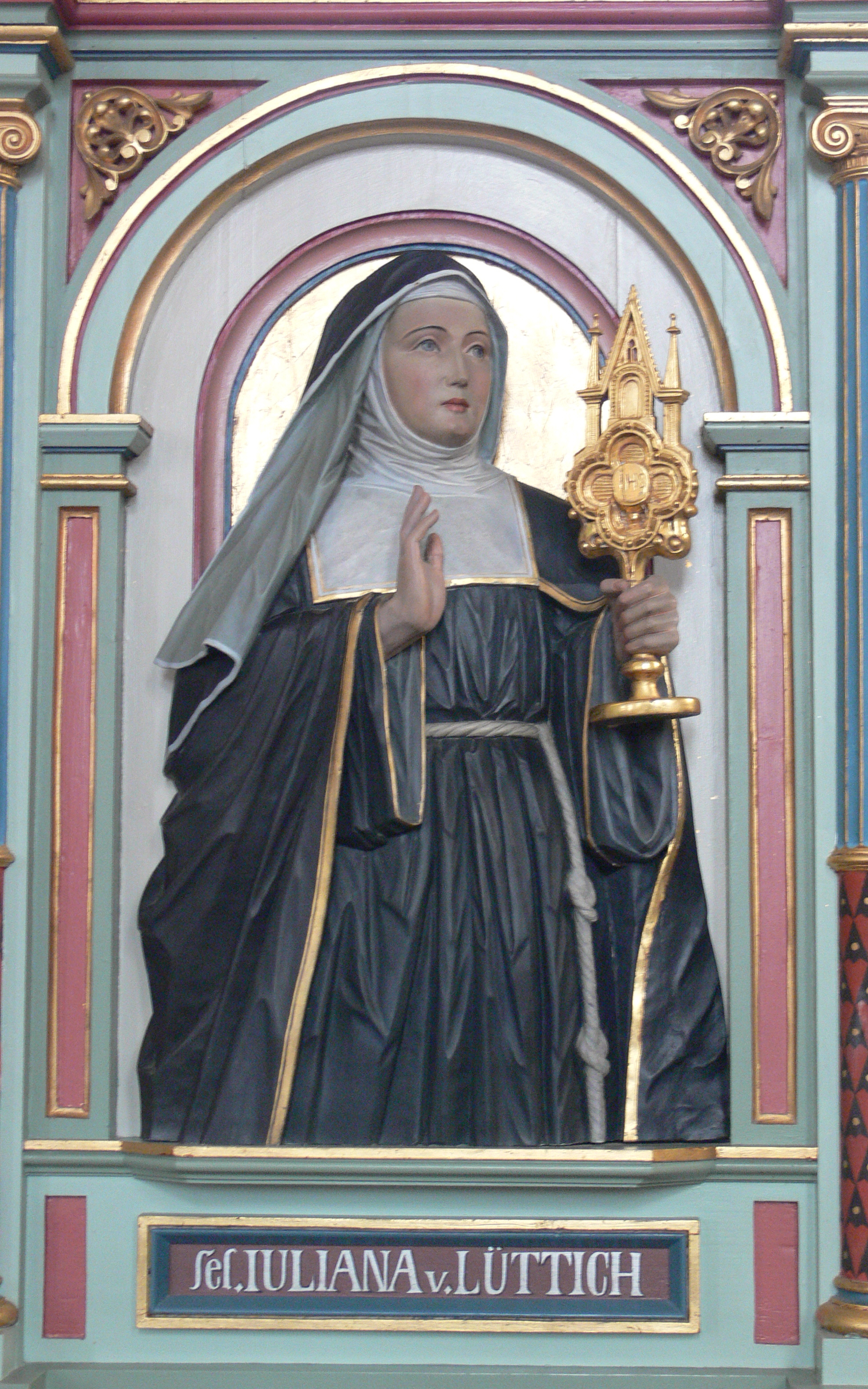 Kath. Pfarrkirche St. Gordian und Epimachus, Merazhofen, Stadt Leutkirch im Allgäu, Landkreis Ravensburg Chorgestühl, 1896, Bildhauer: Peter Paul Metz Juliana von Lüttich